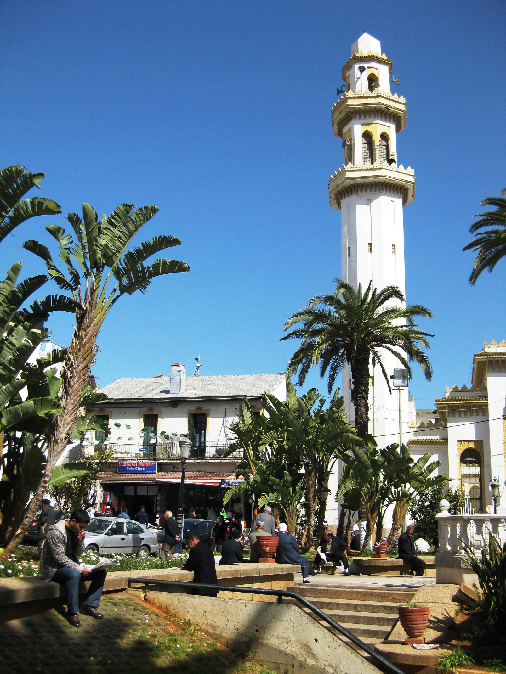 La mosquée d'El Biar à Alger, construite en 1974.